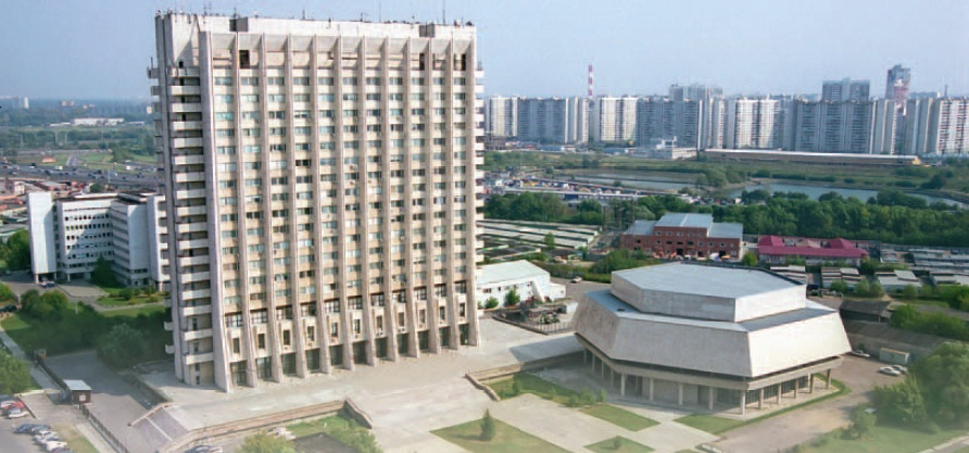 Снимок ВНИИАЭС с вертолета.